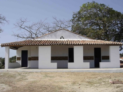 CASA RF